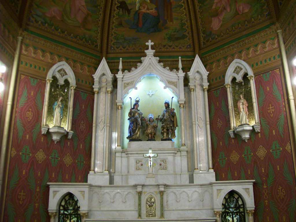 Altar-mór da Catedral N. Srª do Desterro de Jundiaí,SP. No altar a imagem da Sagrada Família.